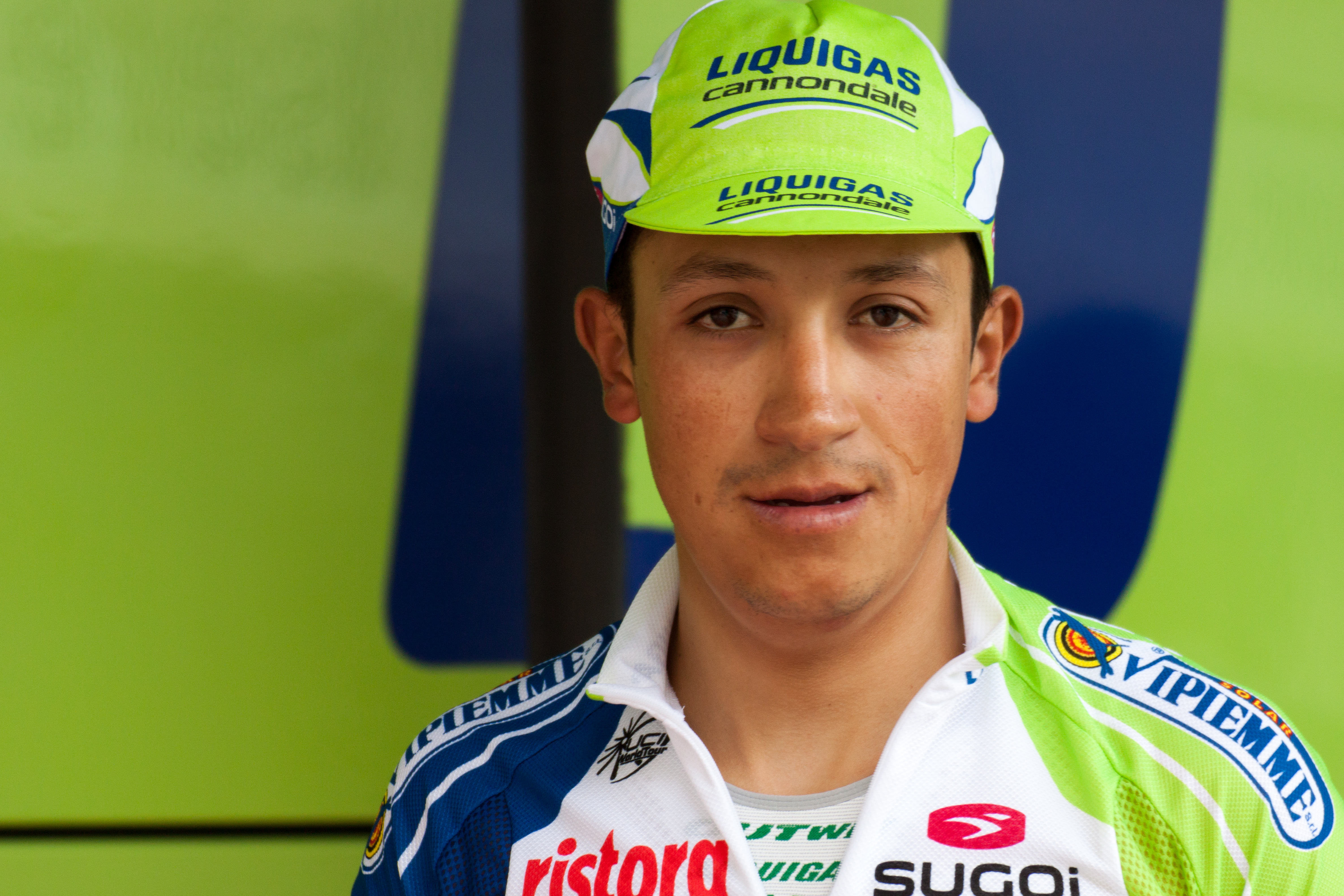 Cayetano Sarmient au Prologue du Critérium du Dauphiné 2012